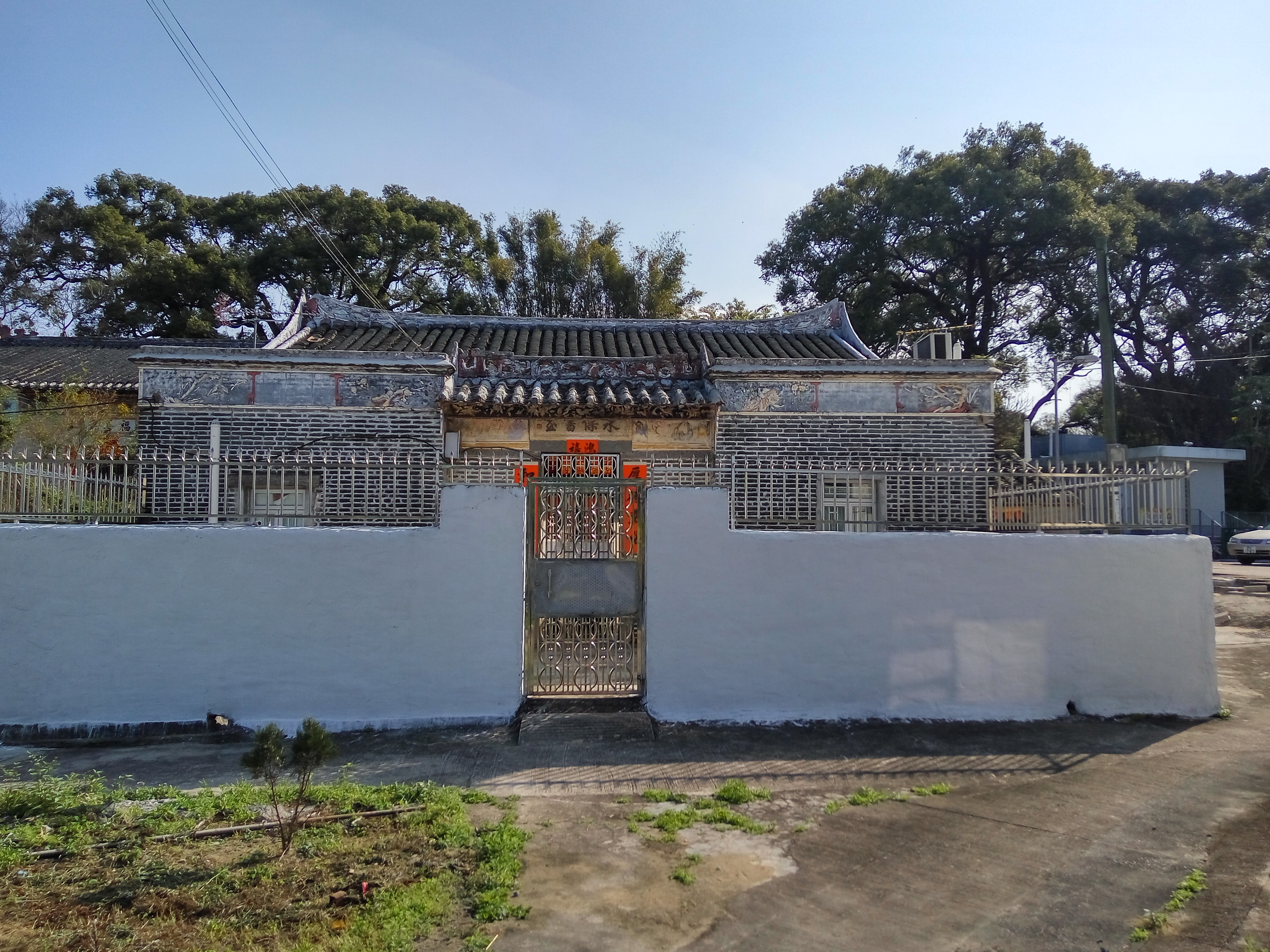 中文（香港）: 打鼓嶺塘坊村永傑書室